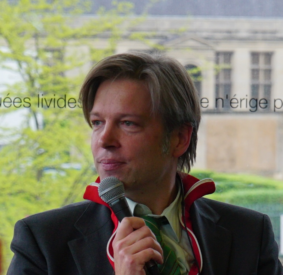 Lors de la journée internationale du Jazz à Reims.